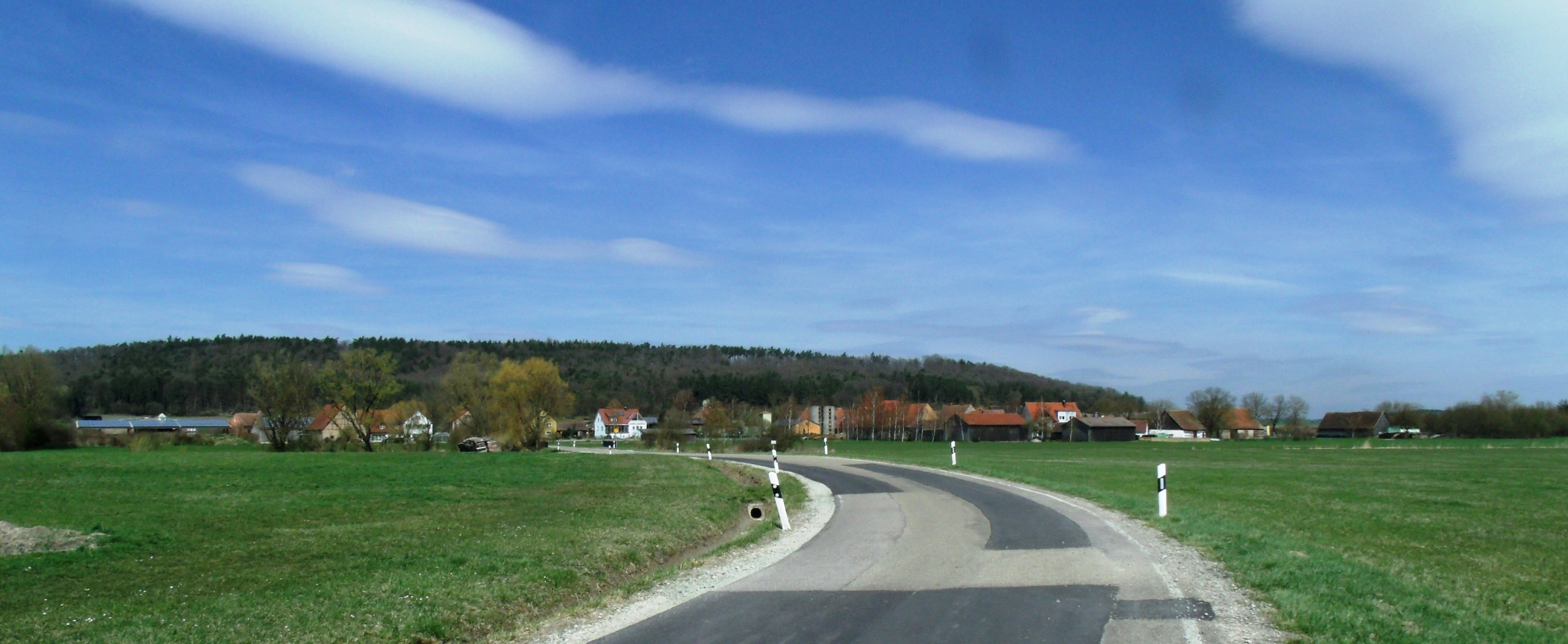 Büchelberg, Ortsteil von Leutershausen im Landkreis Ansbach